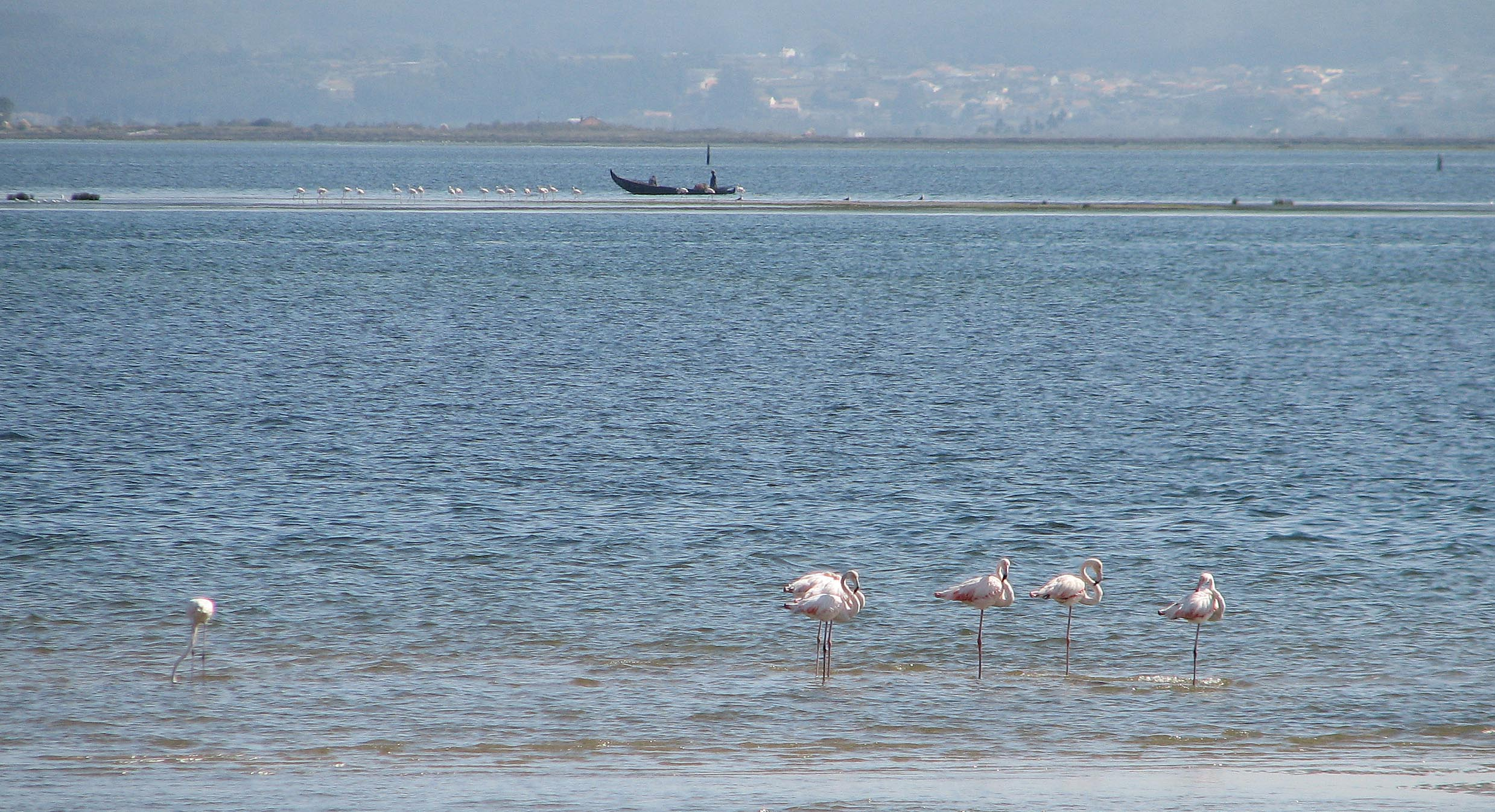 Pousada da Ria Flamingos 01. Murtosa, Portugal